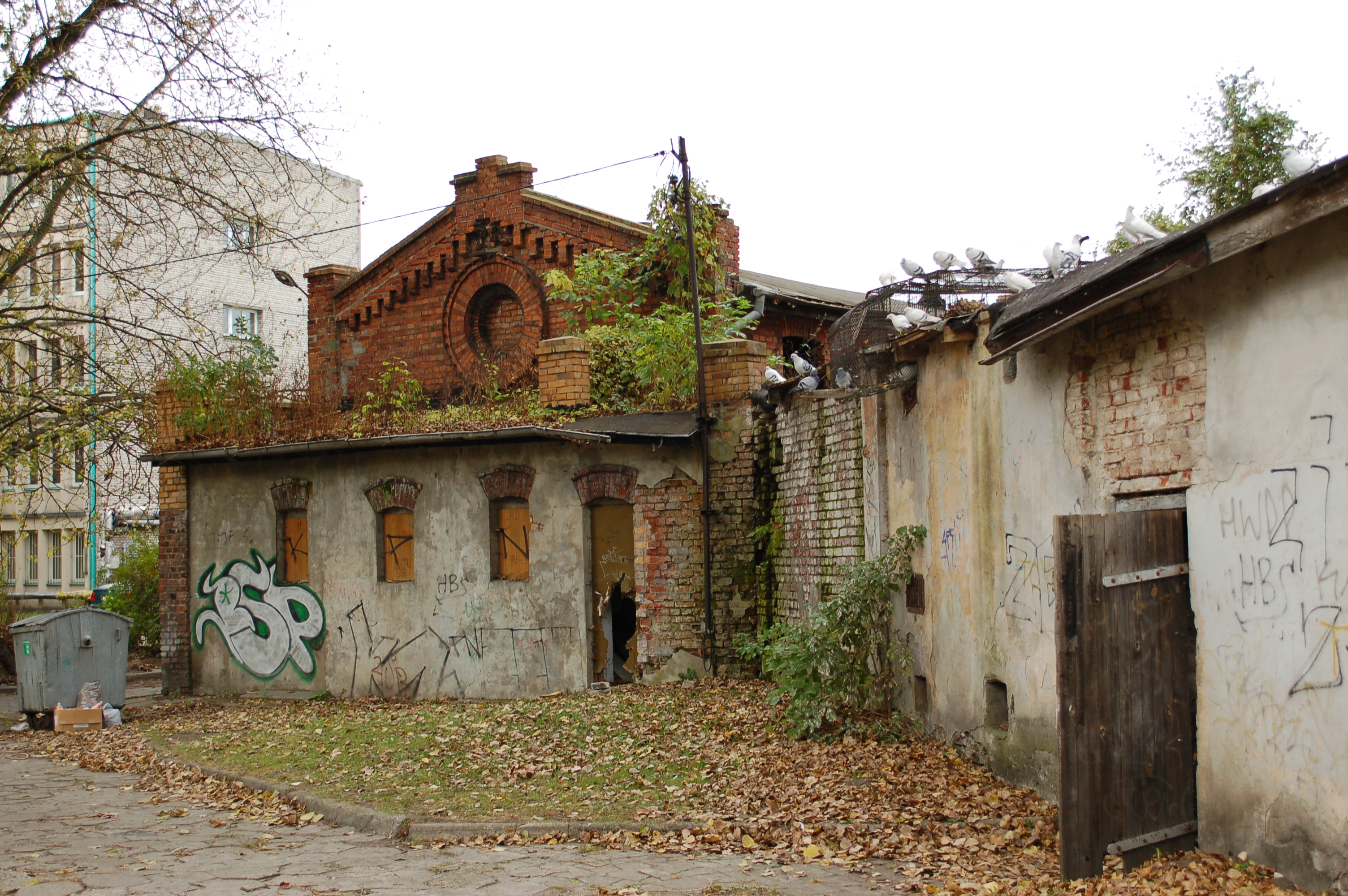 Papierfabrik Konstancin-Jeziorna, Konstans Sp.z o.o. (Metsä-Tissue)